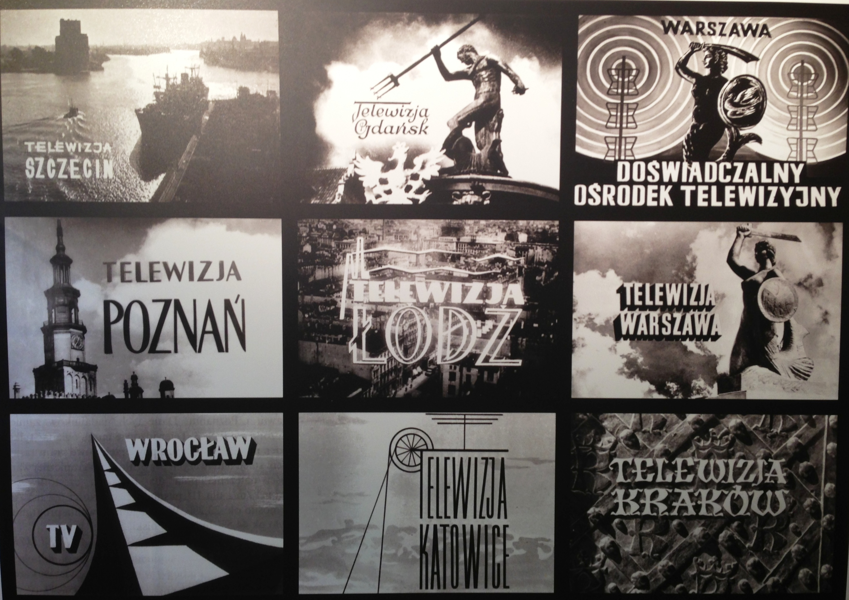 plansze z logo ośrodków regionalnych